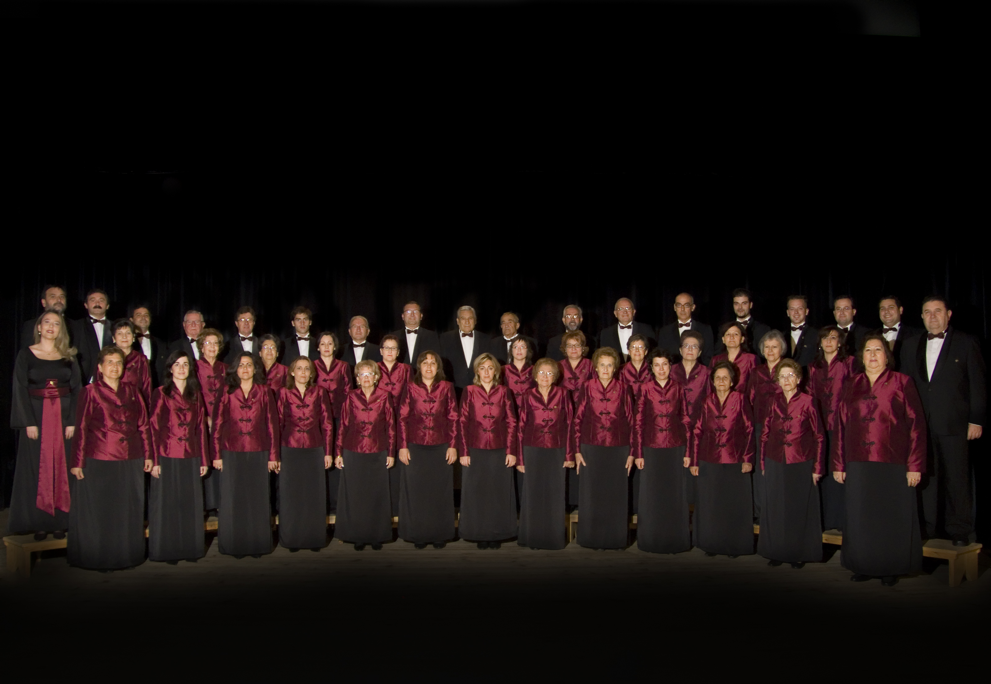 Coral Frexnense